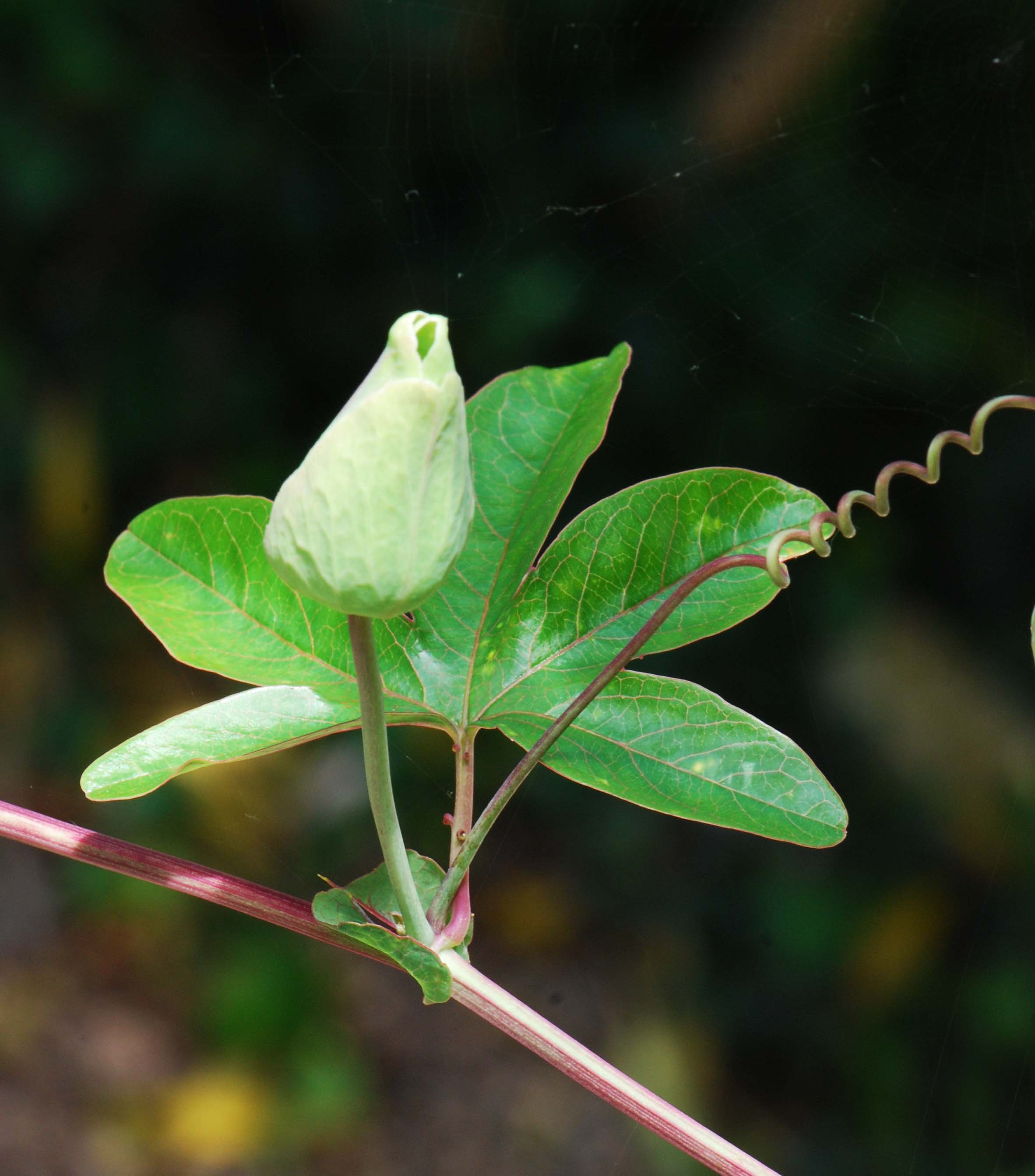 Passiflora caerulea, feuille, vrille et bourgeon floral